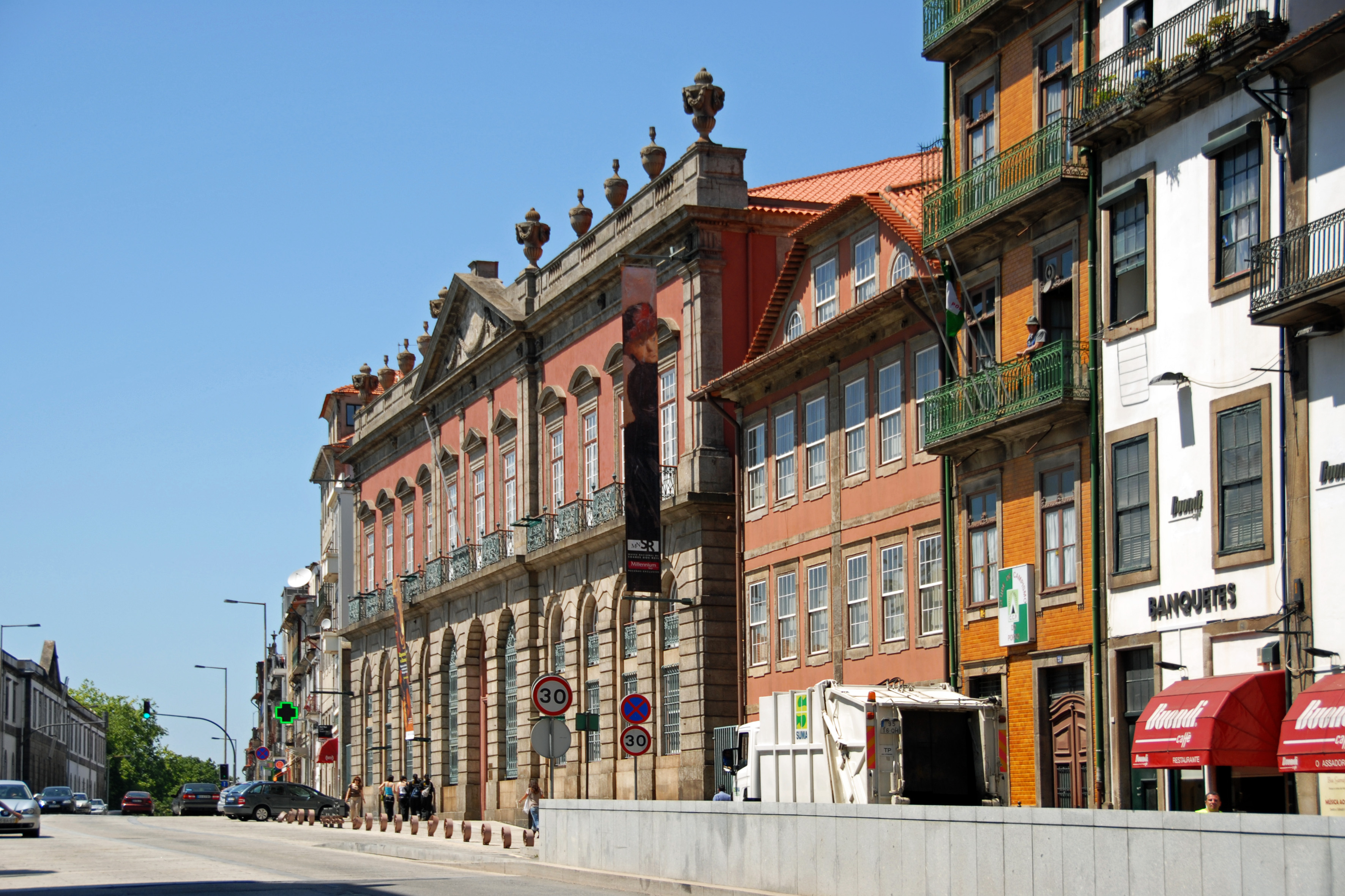 Palácio dos Carrancas ou Museu Nacional de Soares dos Reis